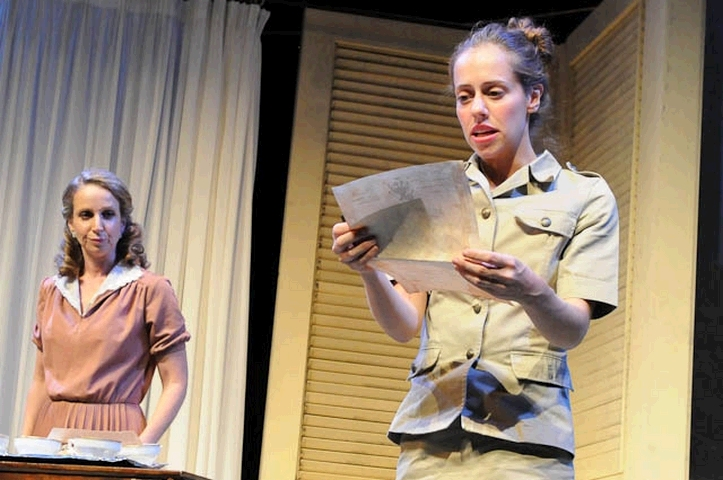 יעל איתן ושירי גולן בהצגה למה לא באת לפני המלחמה בתיאטרון באר שבע